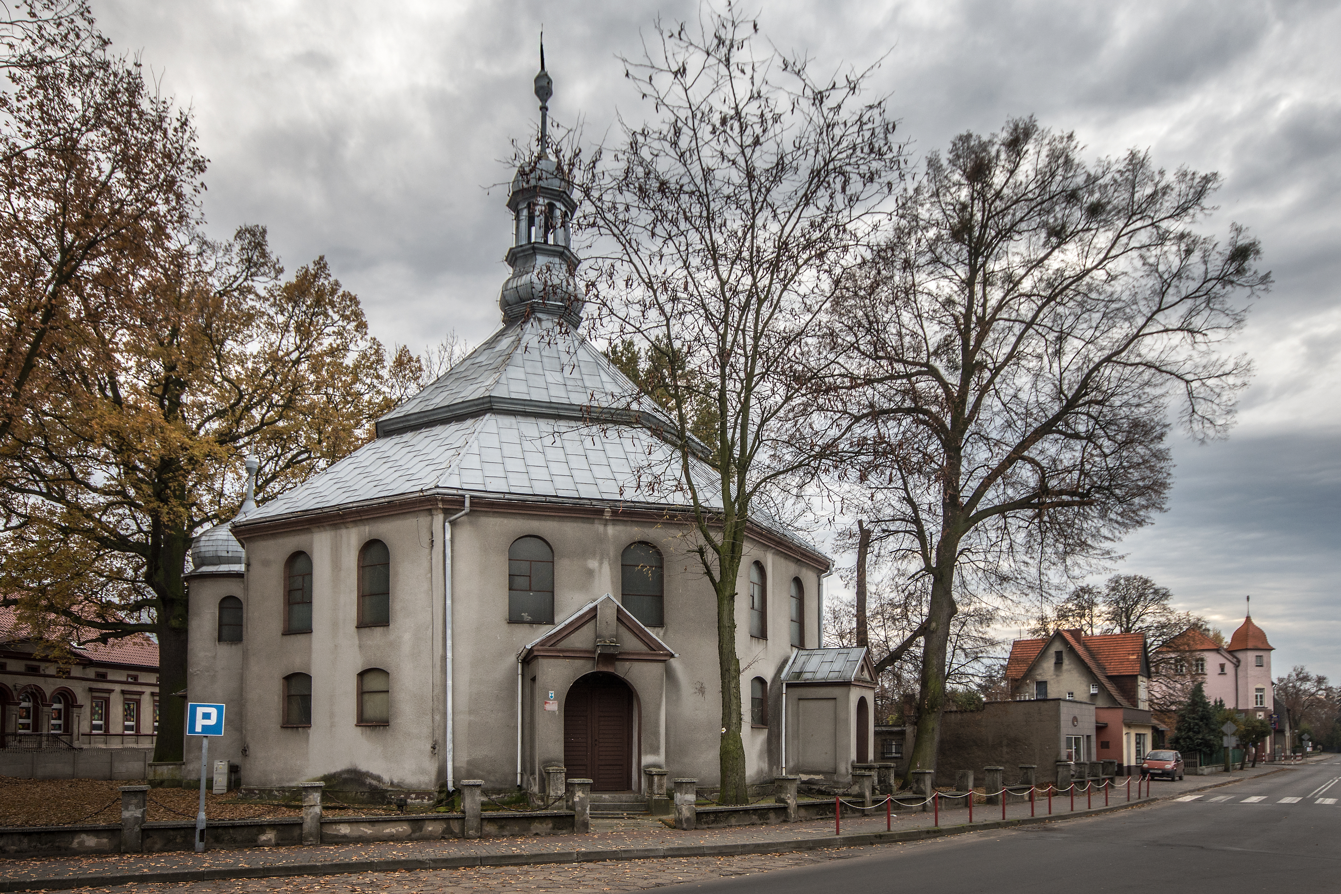 Odolanów, kościół ewangelicki, 1770-1780